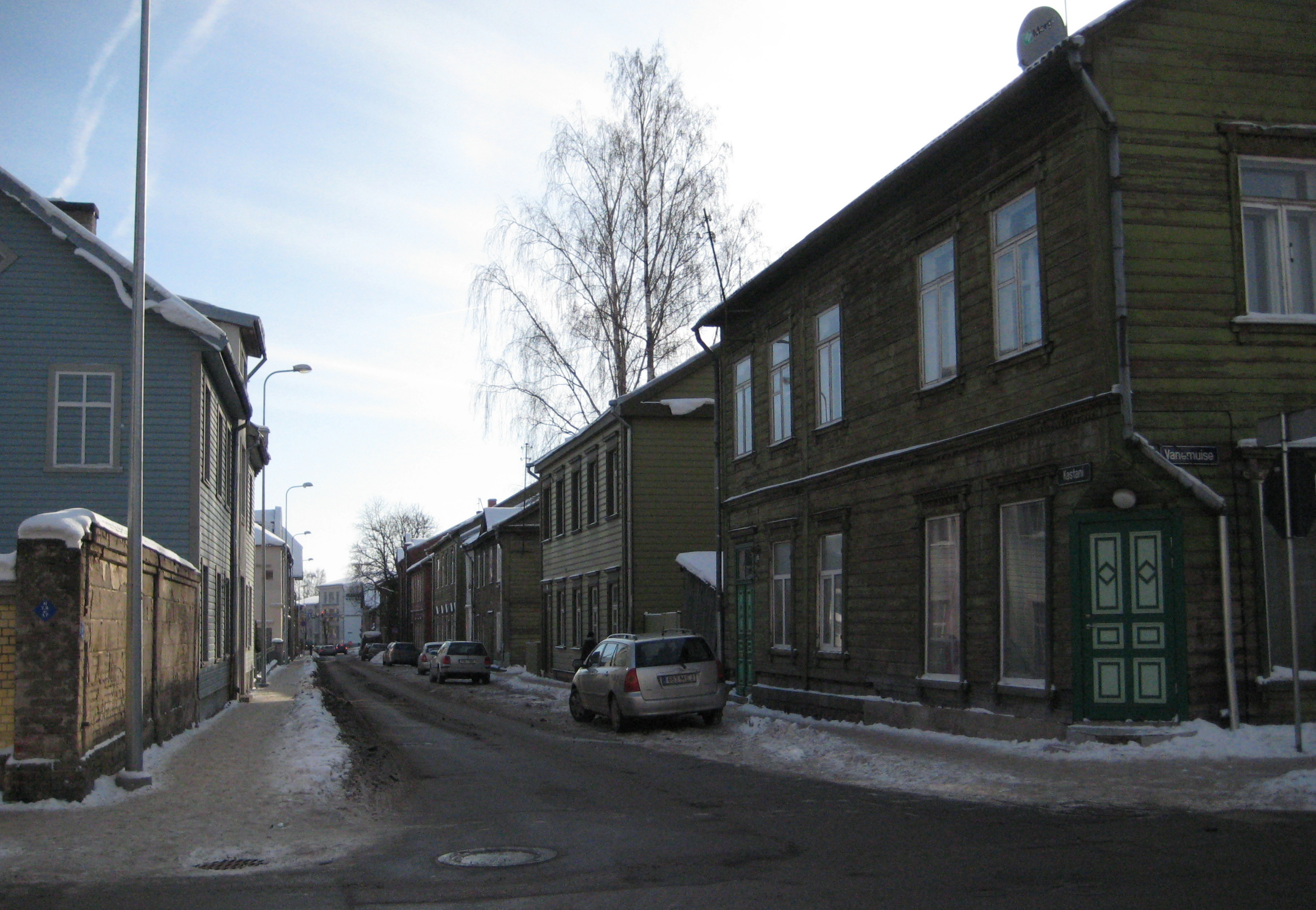 Kastani tänav Vanemuise ristmikult Riia tänava poole, Tartu